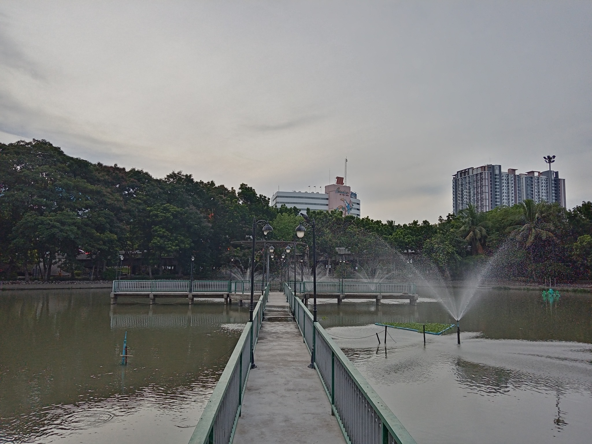 สวนเพชรกาญจนารมย์ เขตบางแค